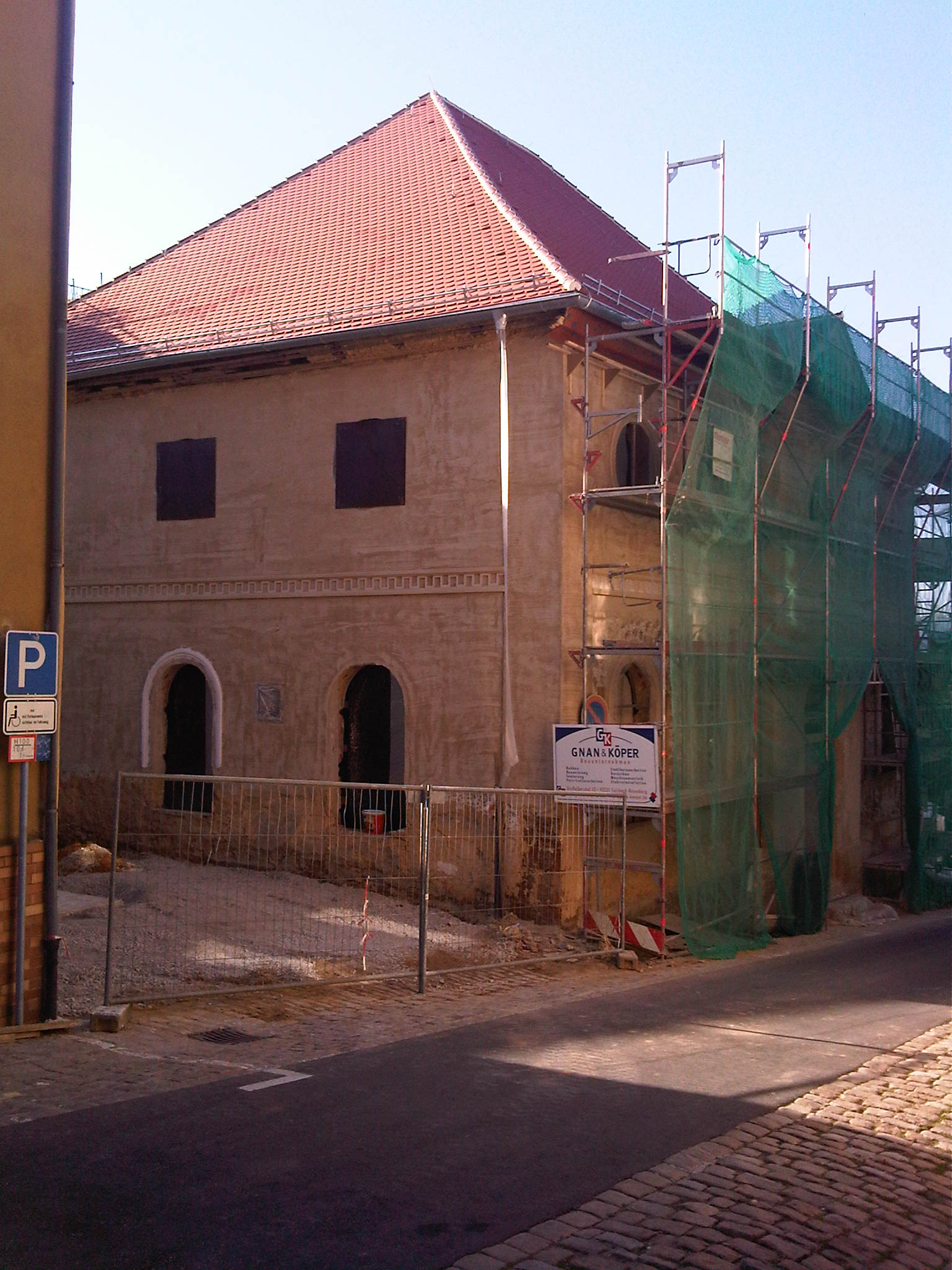 Baustelle der Synagoge Sulzbach